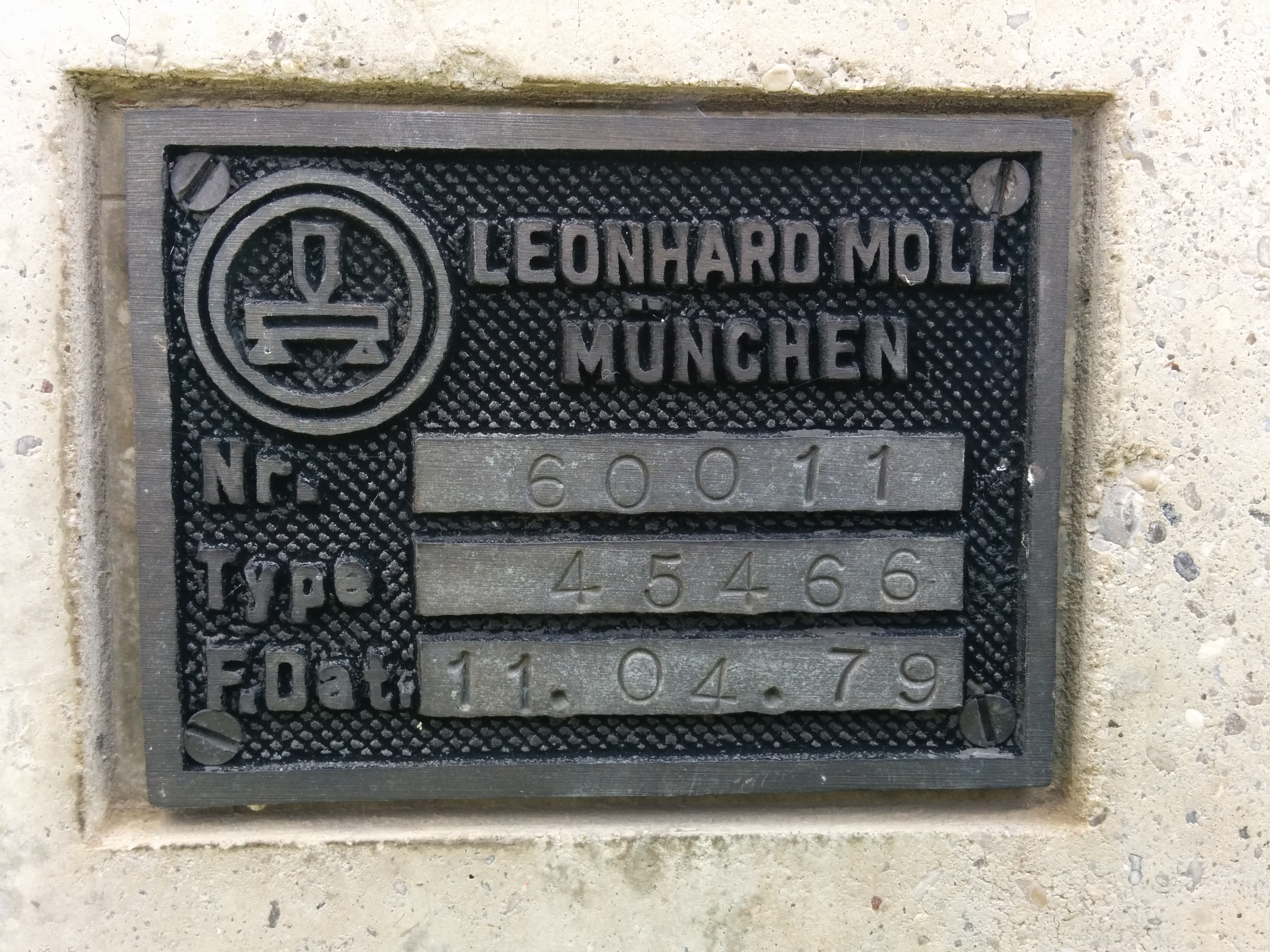 Typenschild an einem Fertigbetonteil eines Bahnschrankensteuerhauses von Leonhard Moll, München. F.Dat. 11.04.1979